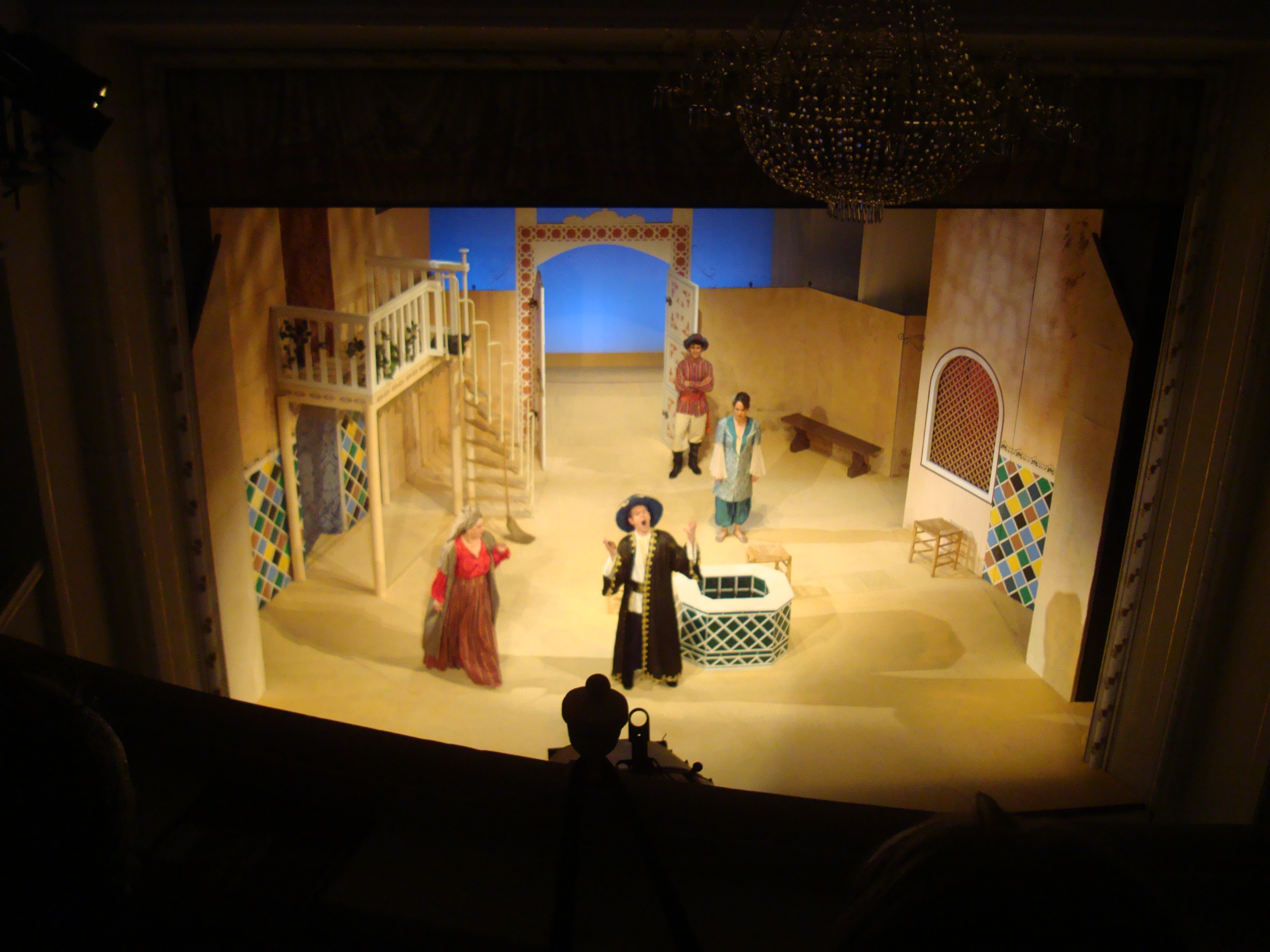 Garcia – Kalif 10